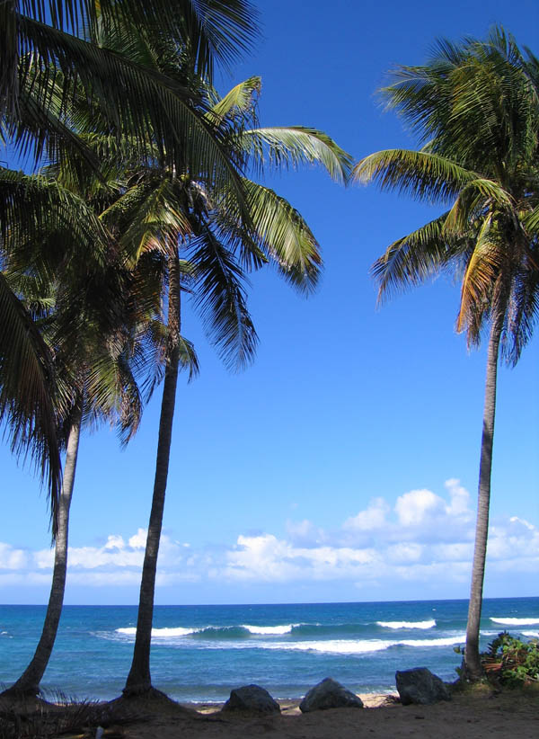 La Chata, Vieques